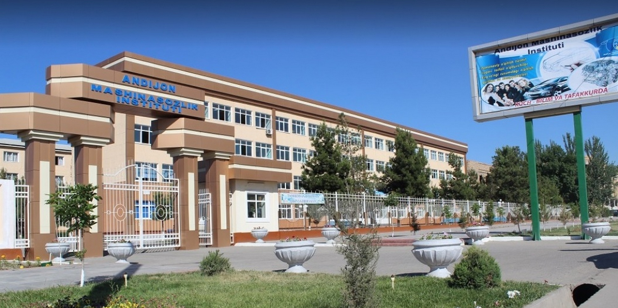 Oʻzbekcha/ўзбекча: Andijon mashinasozlik instituti